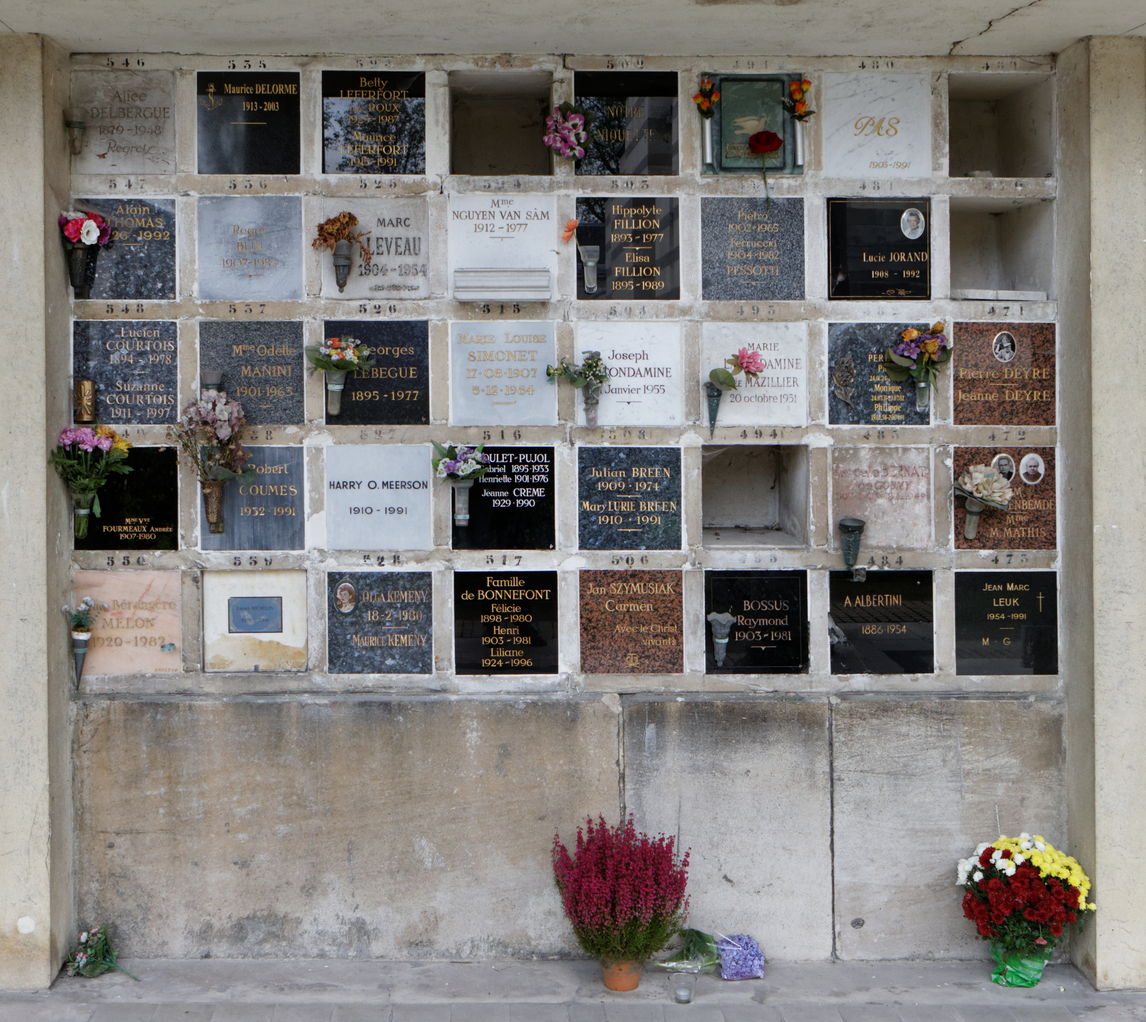 Cases du columbarium du cimetière du Père-Lachaise.